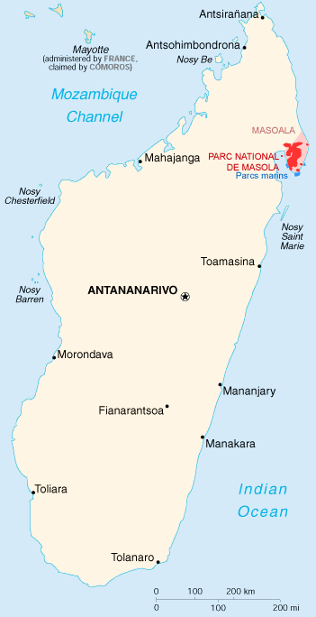 Karte von Madagaskar. Markiert wurden die Masoala-Halbinsel (rosa) und der Masoala-Nationalpark (rot) mit den geschützten Korallenriffen (dunkelblau).